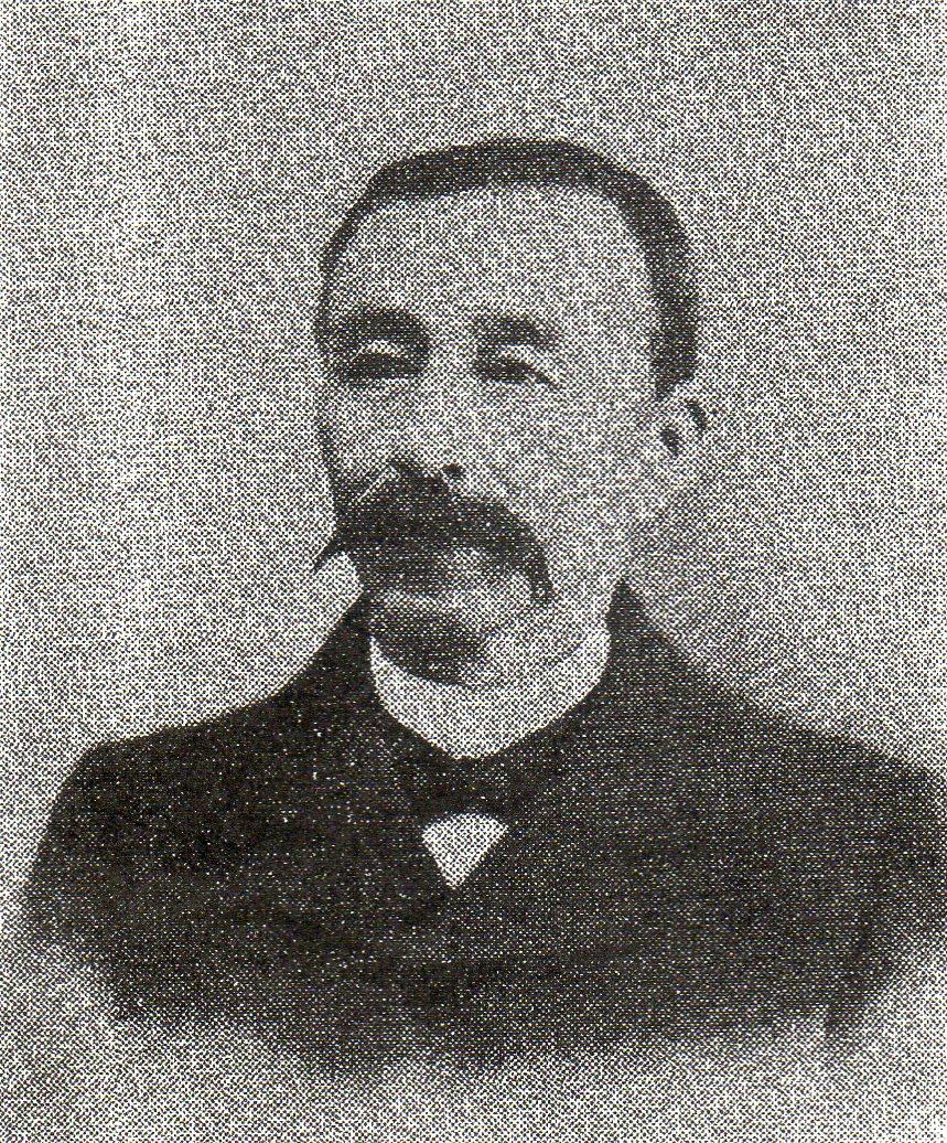 米沢藩士・大日本帝国海軍大尉、曾根俊虎写真複製。